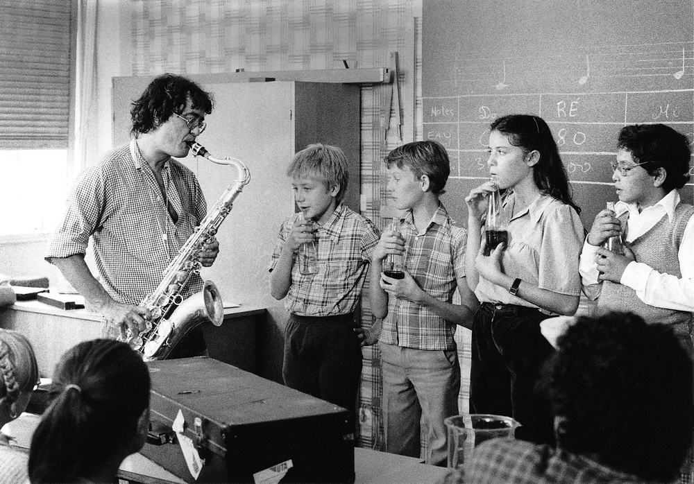 Jacques Denis. Photo réalisée à Vénissieux, lors du tournage du téléfilm "Le Professeur jouait du saxophone" pour la série "Cinéma 16".